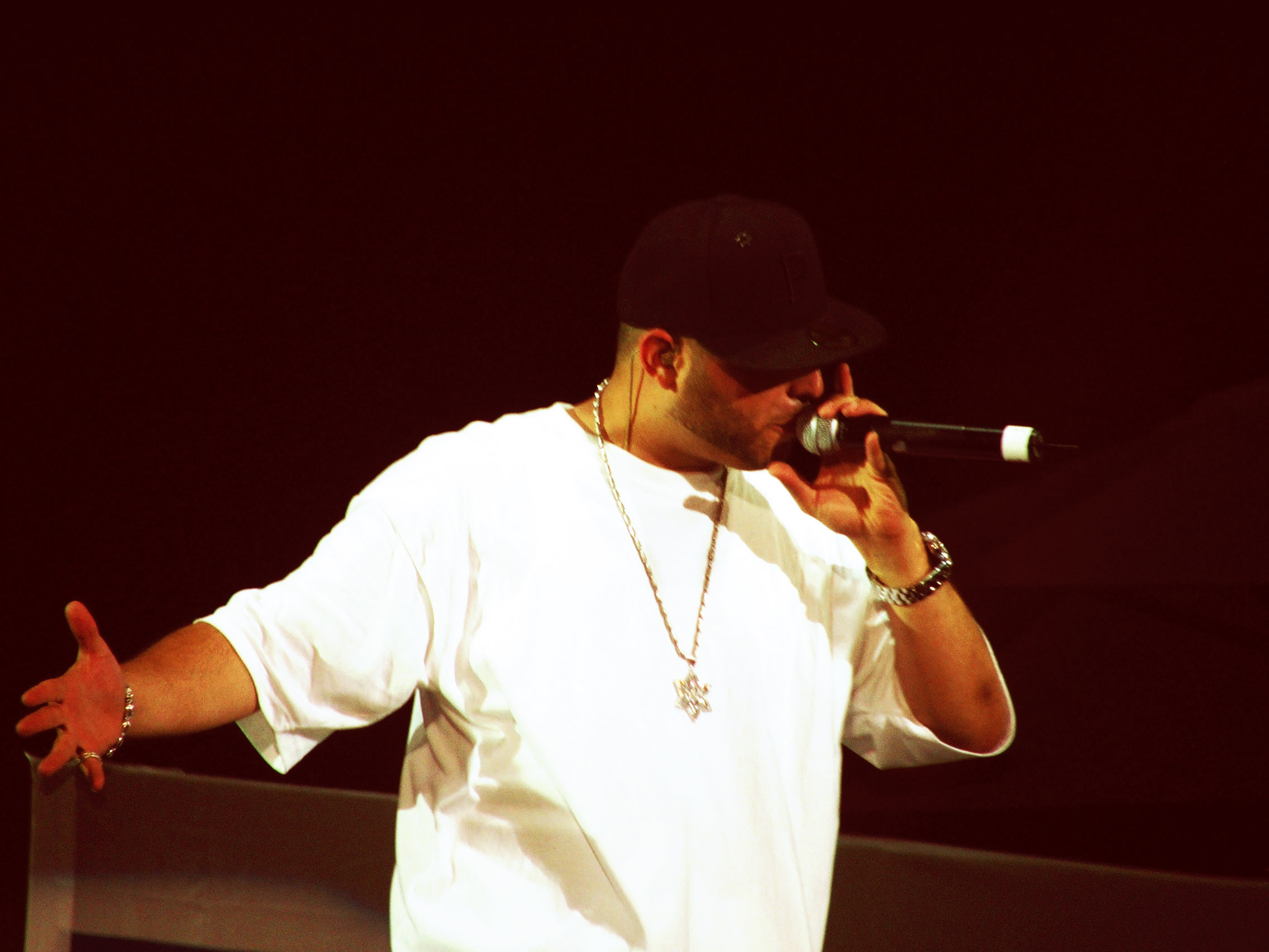 subliminal - israeli raper in a show